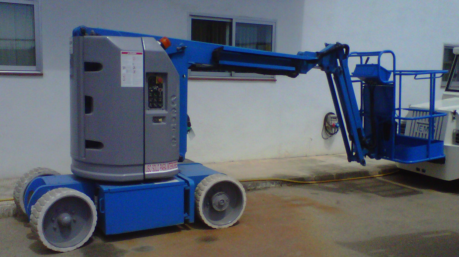 Plataforma elevadora articulada marca Genie